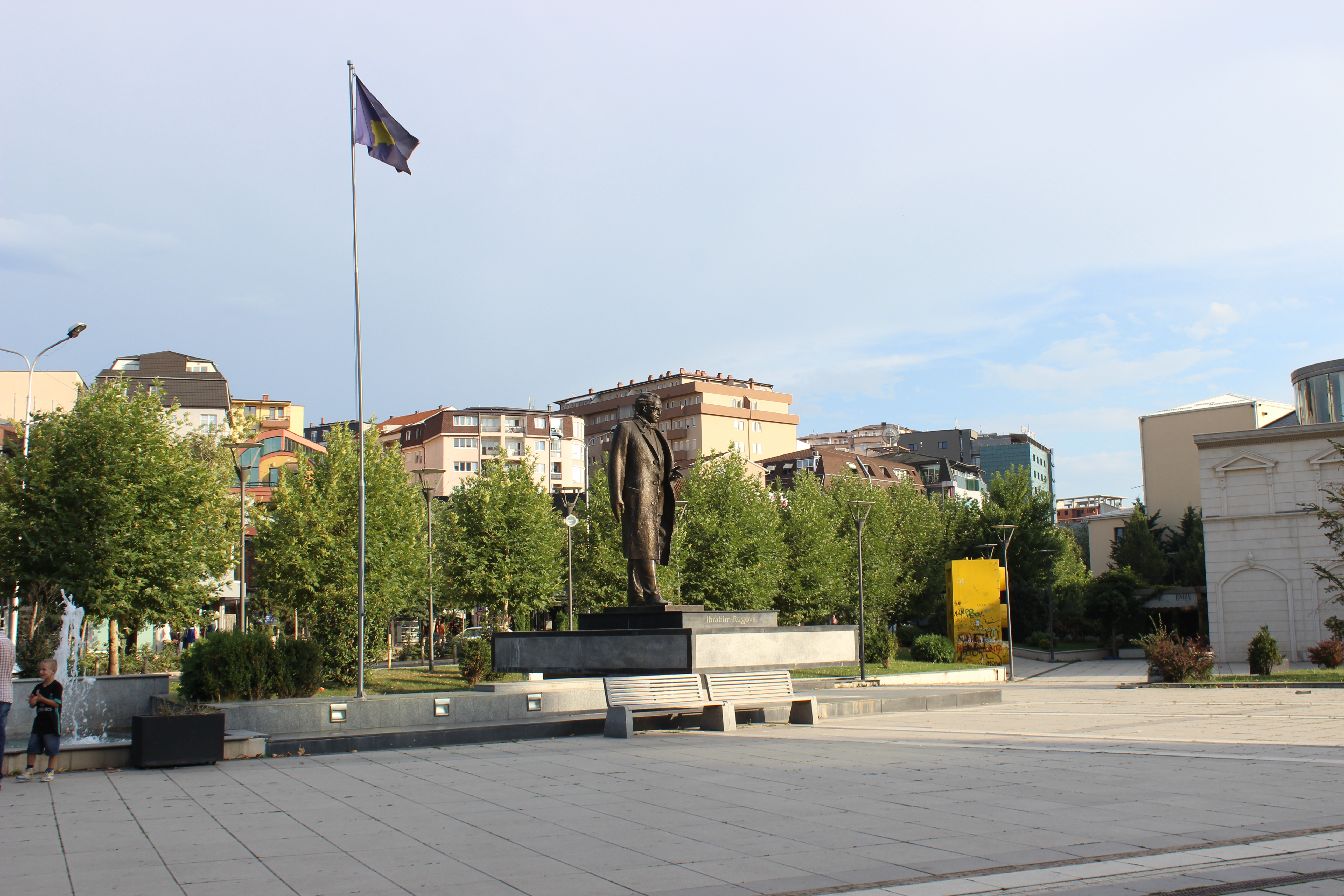 Sheshi Ibrahim Rugova me permendoren e Presidentit, Prishtine.